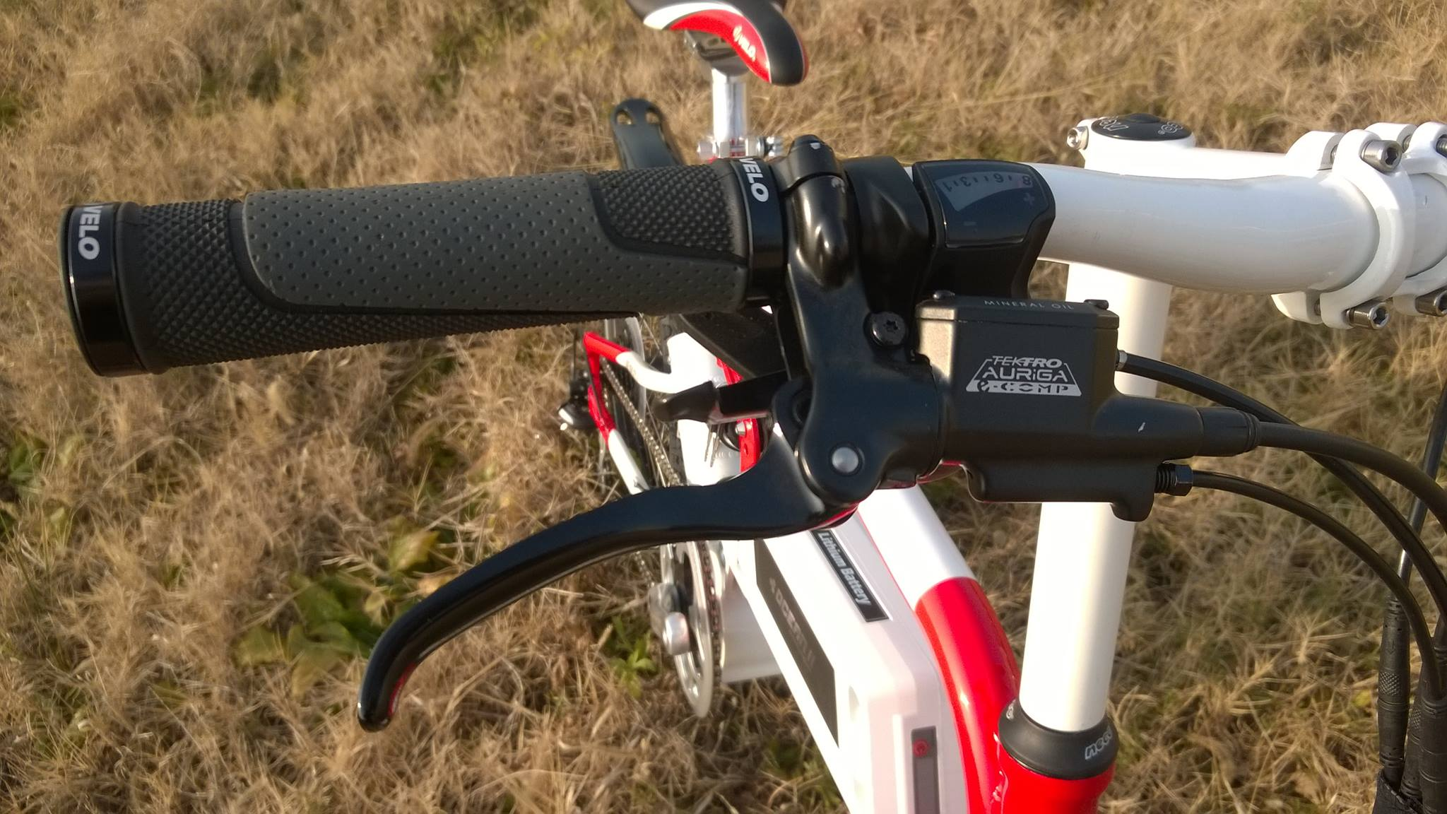 ידית ברקס הידראולית לאופניים חשמליים